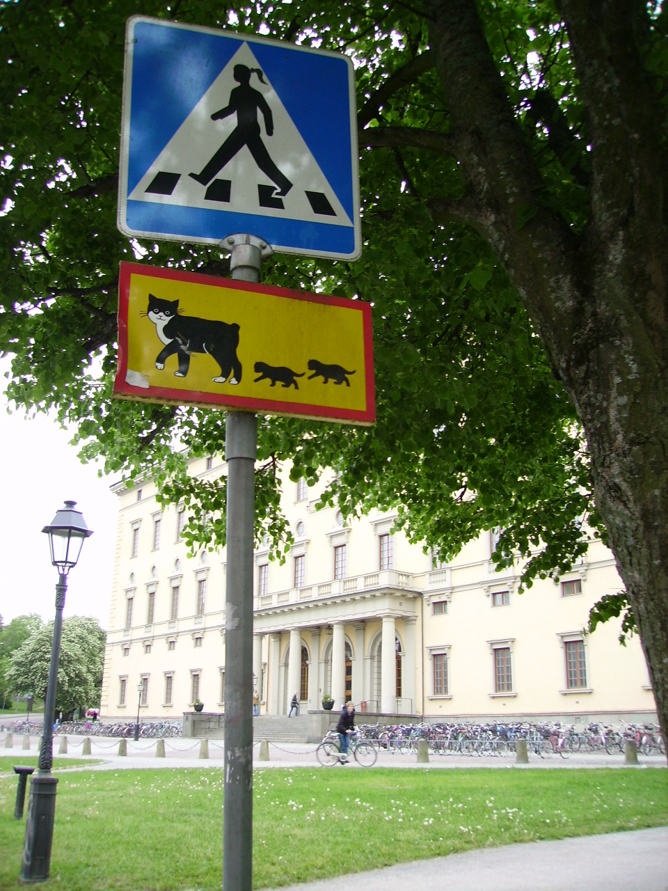 Przejście dla kotów przed biblioteką Uniwersytetu w Uppsali. Zdjęcie wykonała 29.05.2007 r. Ilona Miłkoś, która udzieliła zgody na jego wykorzystanie.